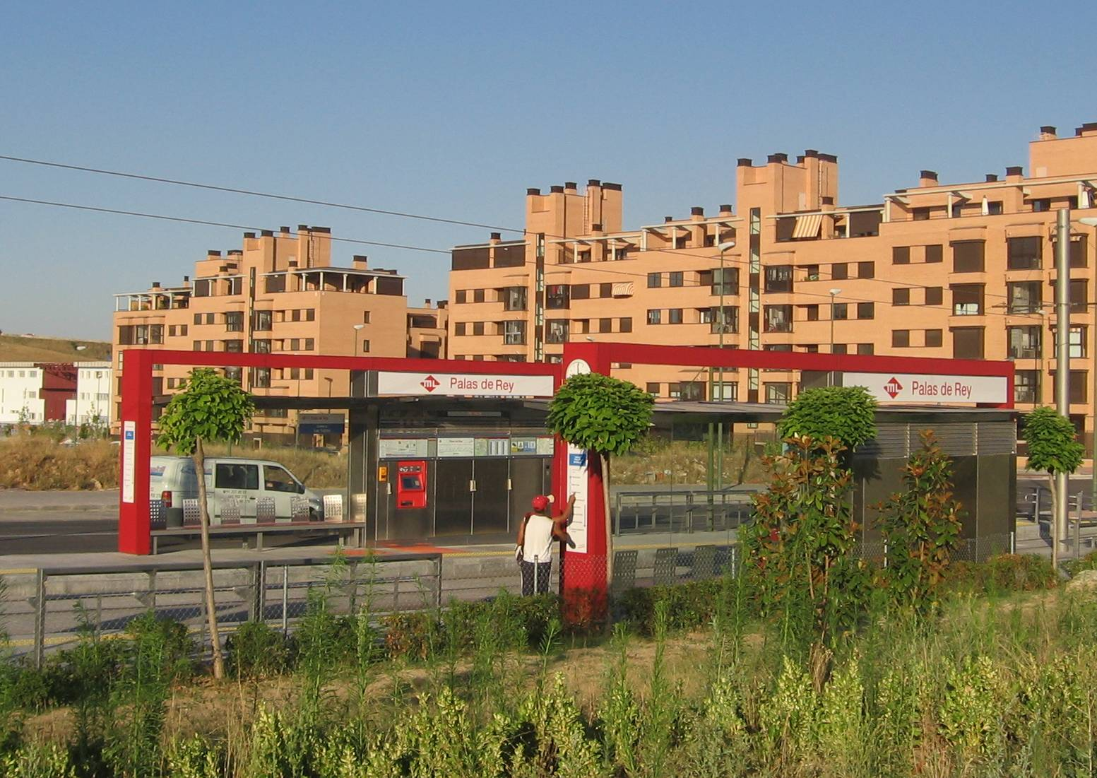 Palas del Rey light rail station, Madrid. Estación de metro ligero de Palas del Rey, Madrid.